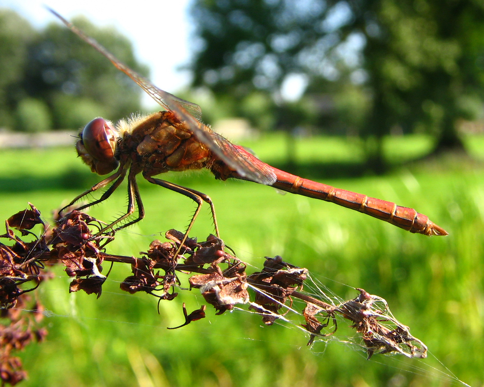 Sympetrum vulgatum